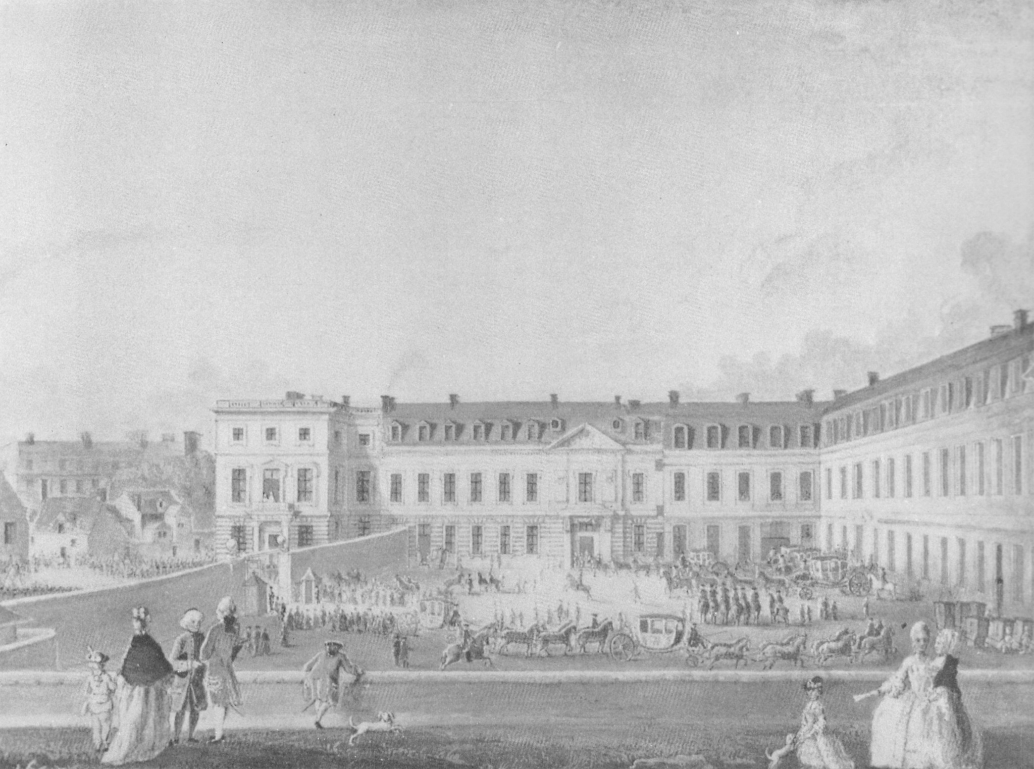 Ehrenhof des Schlosses Compiègne um 1770